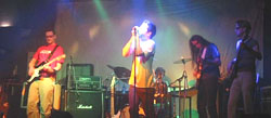 Live im Orpheum Graz 2002